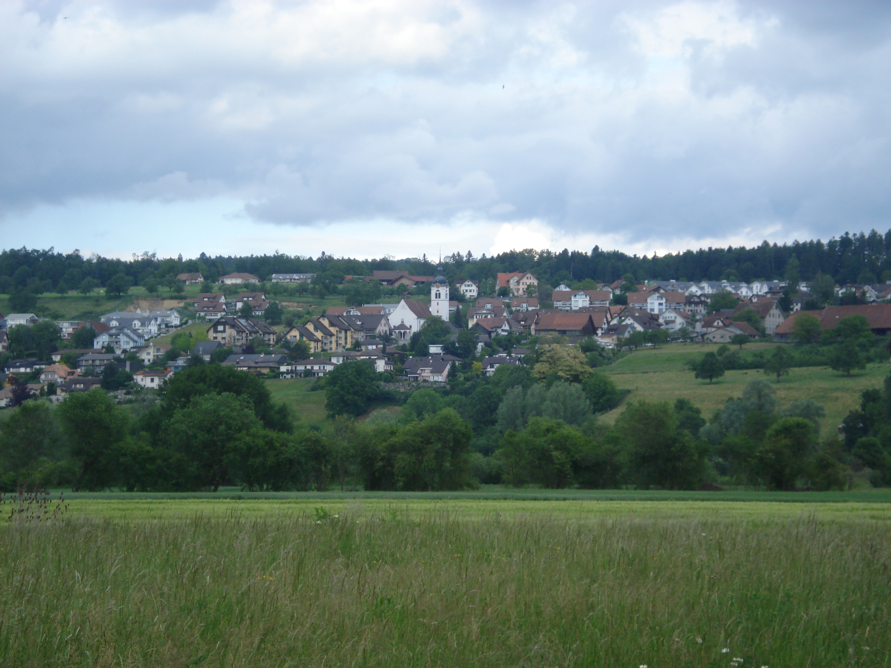 Föti vom Dorf Oberlunkhofe a de Rüss/Imago vici Oberlunkhofen apud Rusam fluminem siti